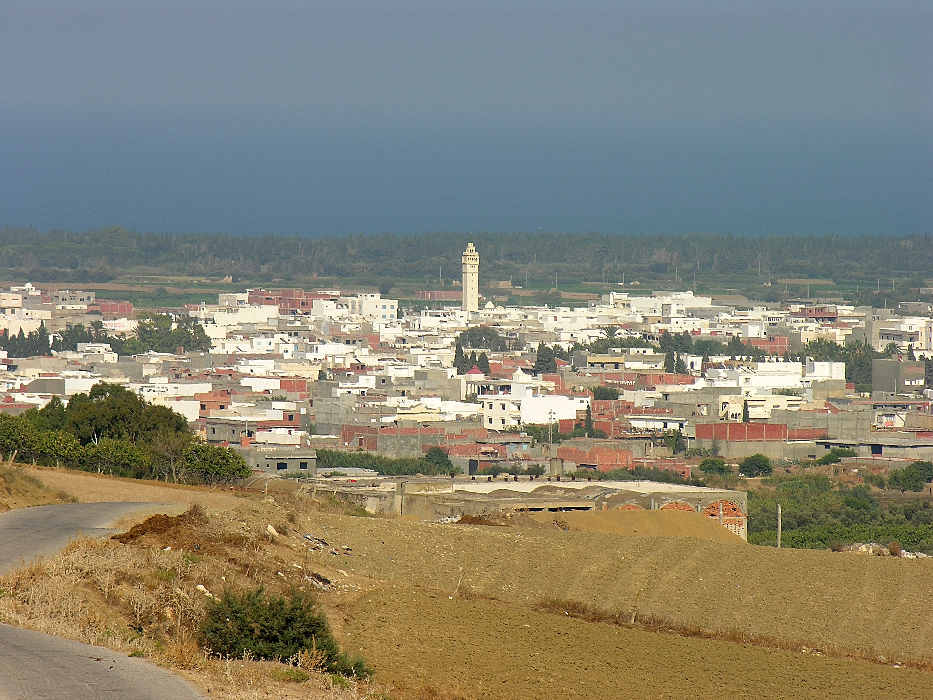 Vue de Ras Jebel